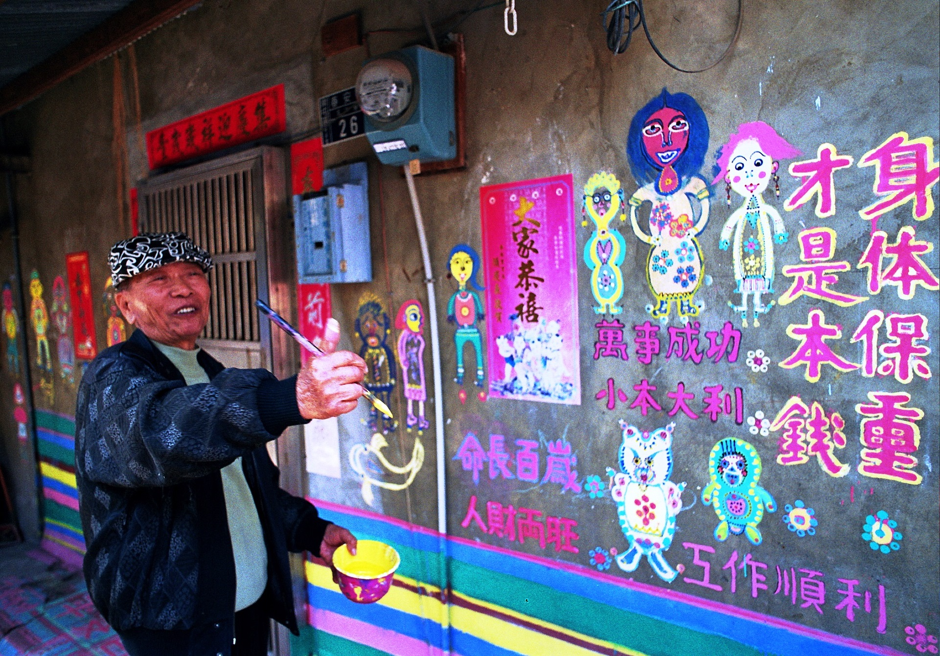 春安路56巷 彩紅眷村